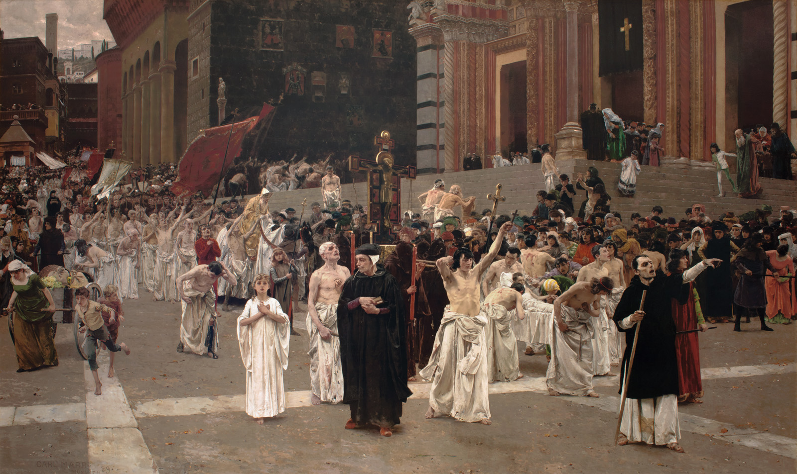 Carl von Marr: Die Flagellanten, 1889, Museum of Wisconsin Art, West Bend WI. Die Flagellanten oder Geißler waren eine christliche Laienbewegung im 13. und 14. Jahrhundert.